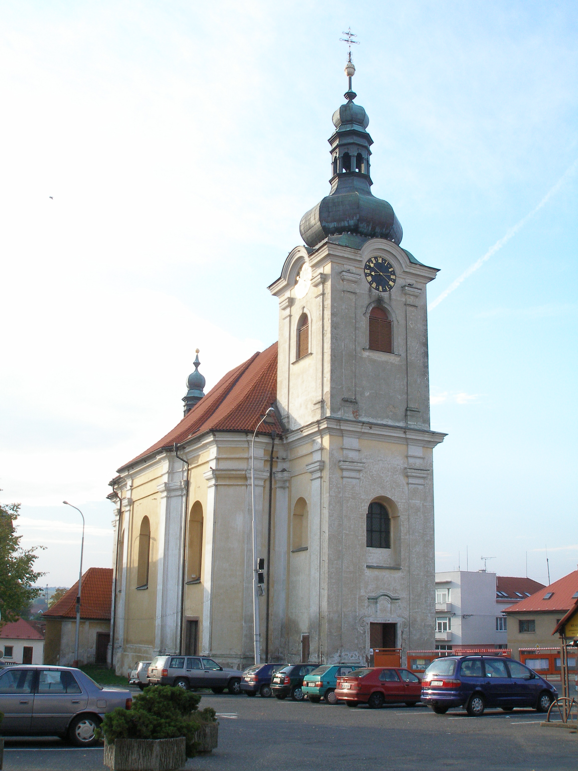 Uhlířské Janovice - kostel sv. Aloise